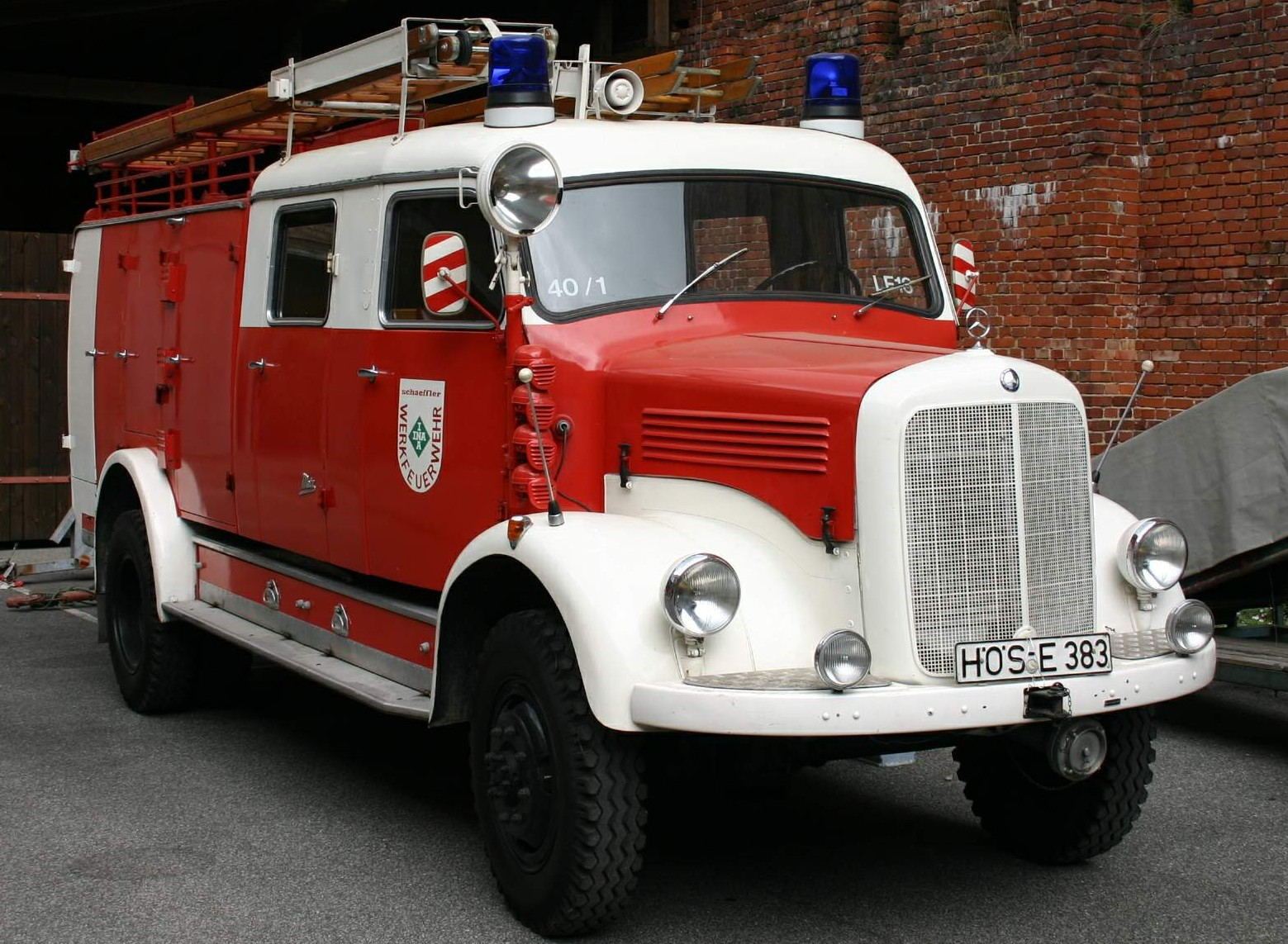 Löschgruppenfahrzeug LF 16 (ehemals Werkfeuerwehr INA)